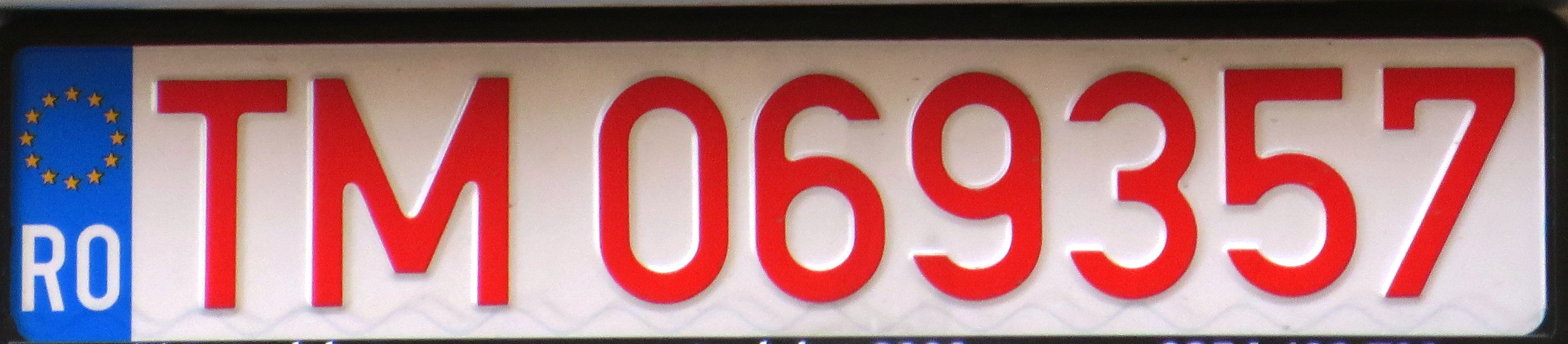 kentekenplaat uit Roemenië - Timișoara